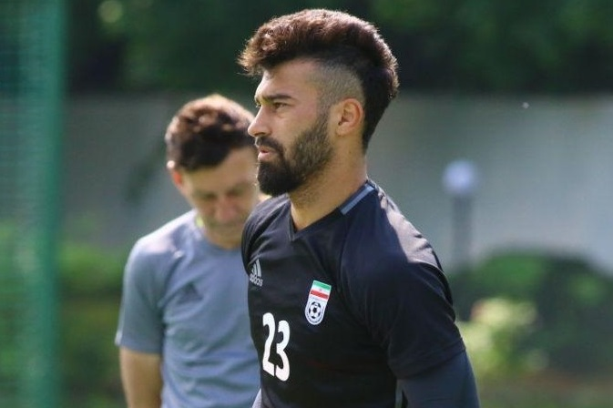 تصاویری از تمرین تیم فوتبال ایران